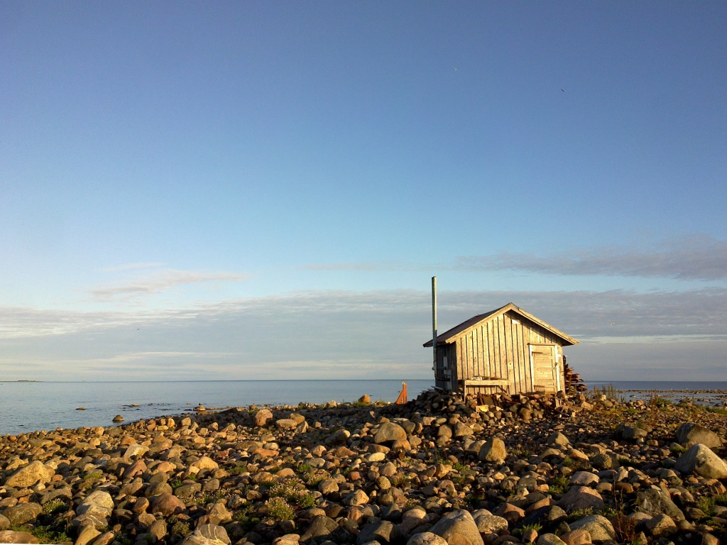 Vanha kalastajamökki Pallosessa